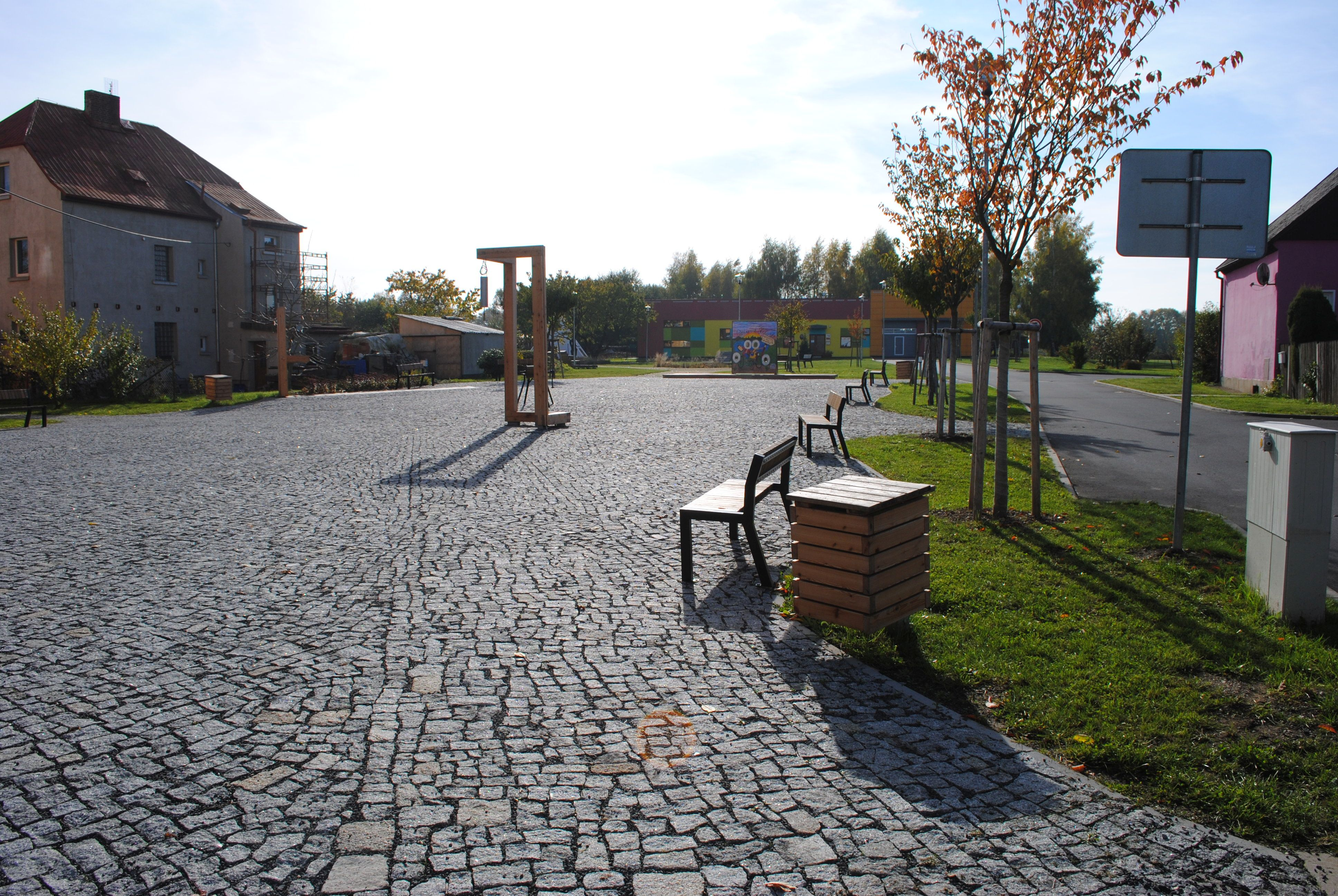 Zentrum von Krasna